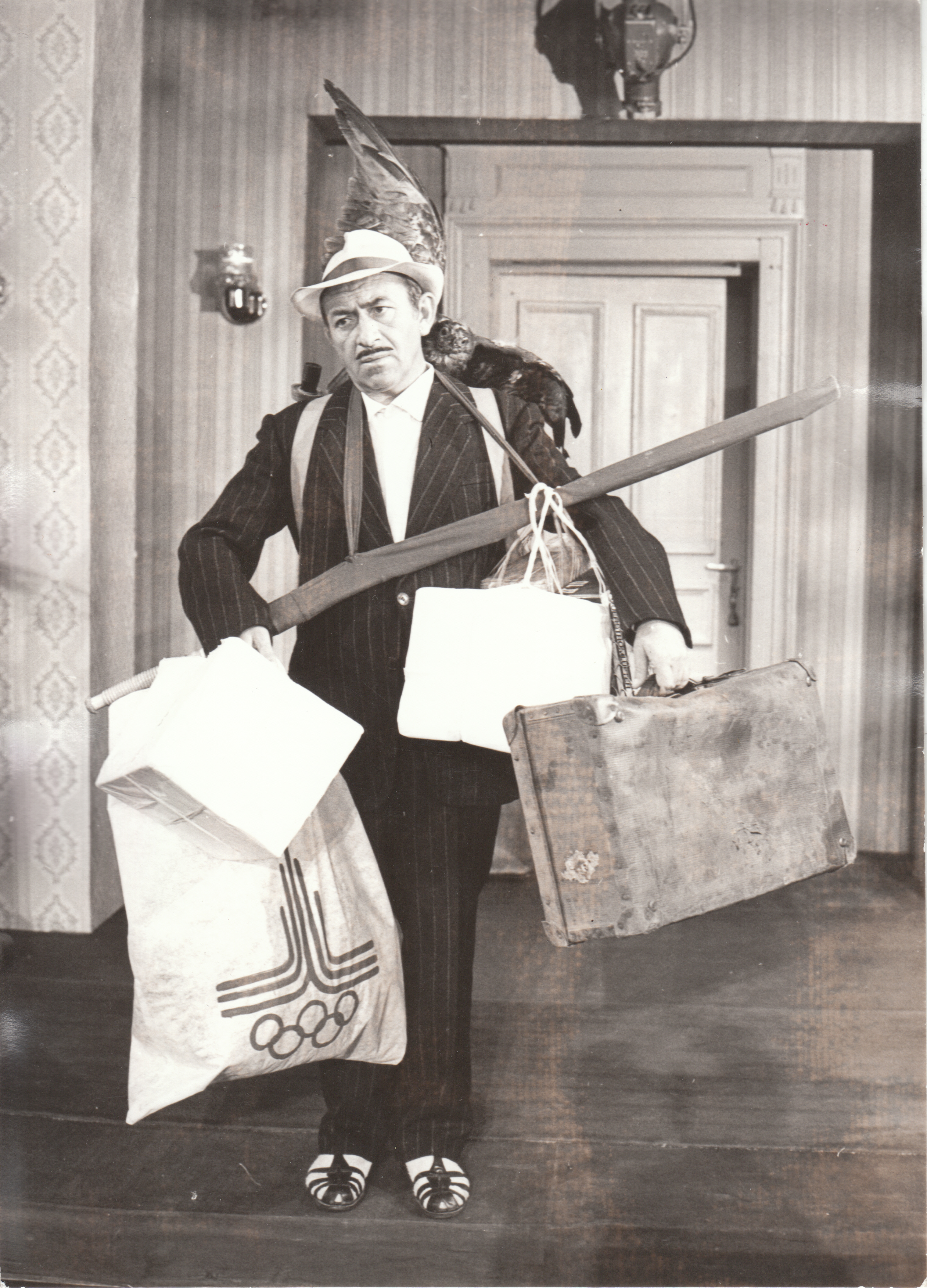 „Феномени“ - режисьор Слави Шкаров Минко Минков в ролята на Сергей Клягин